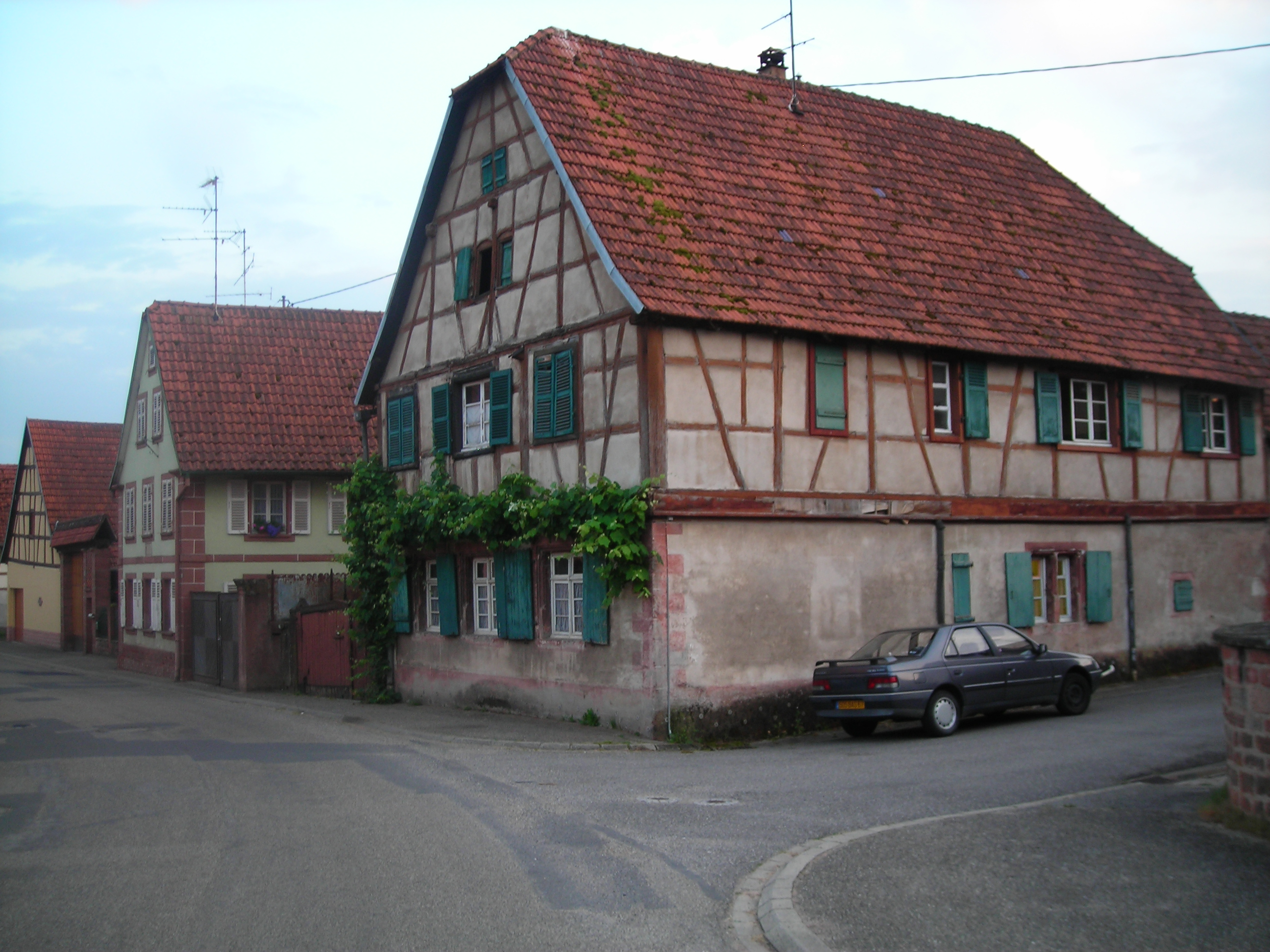 La maison N° 6 de Obersoultzbach